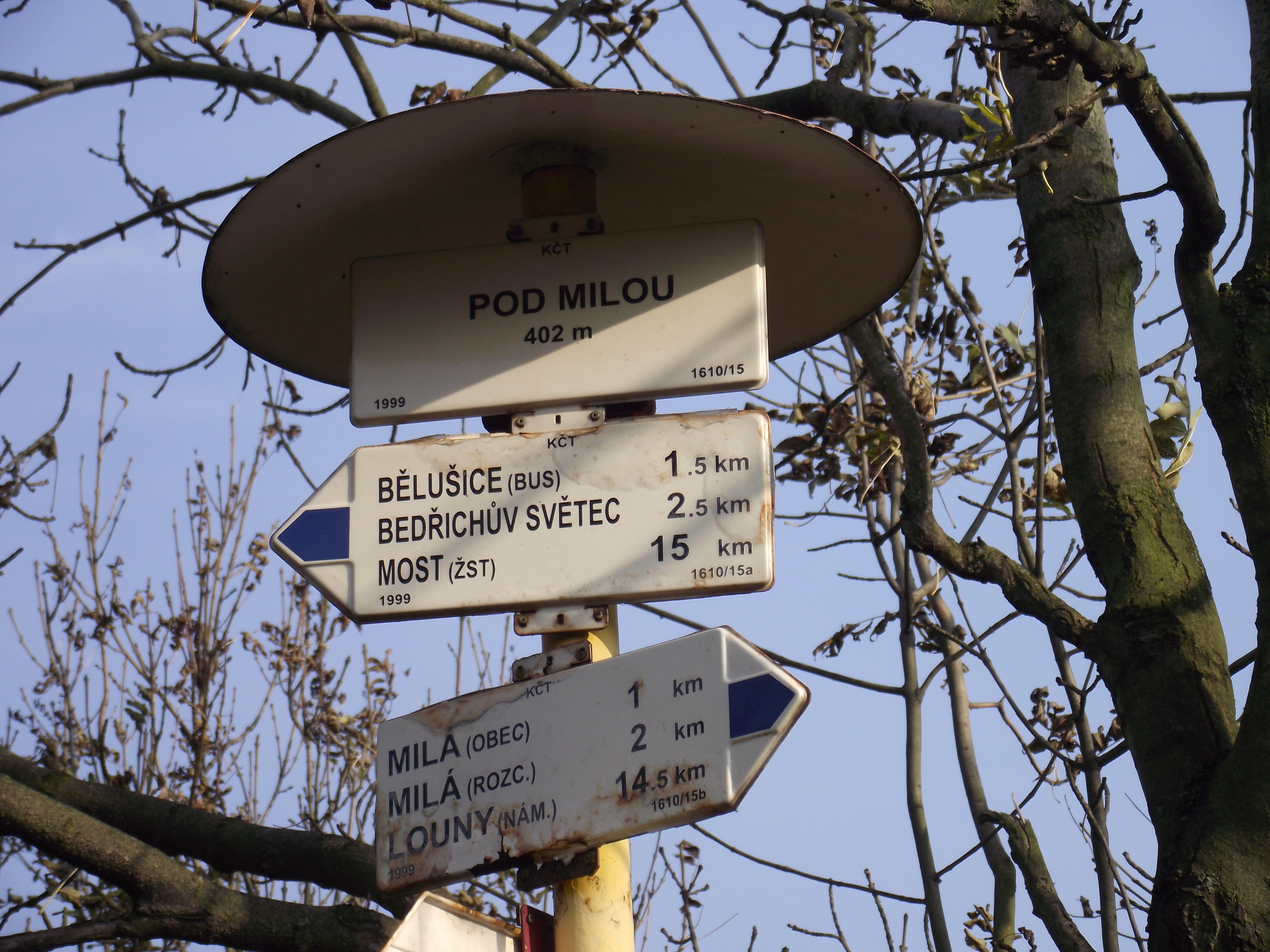 Rozcestník pod vrcholem.